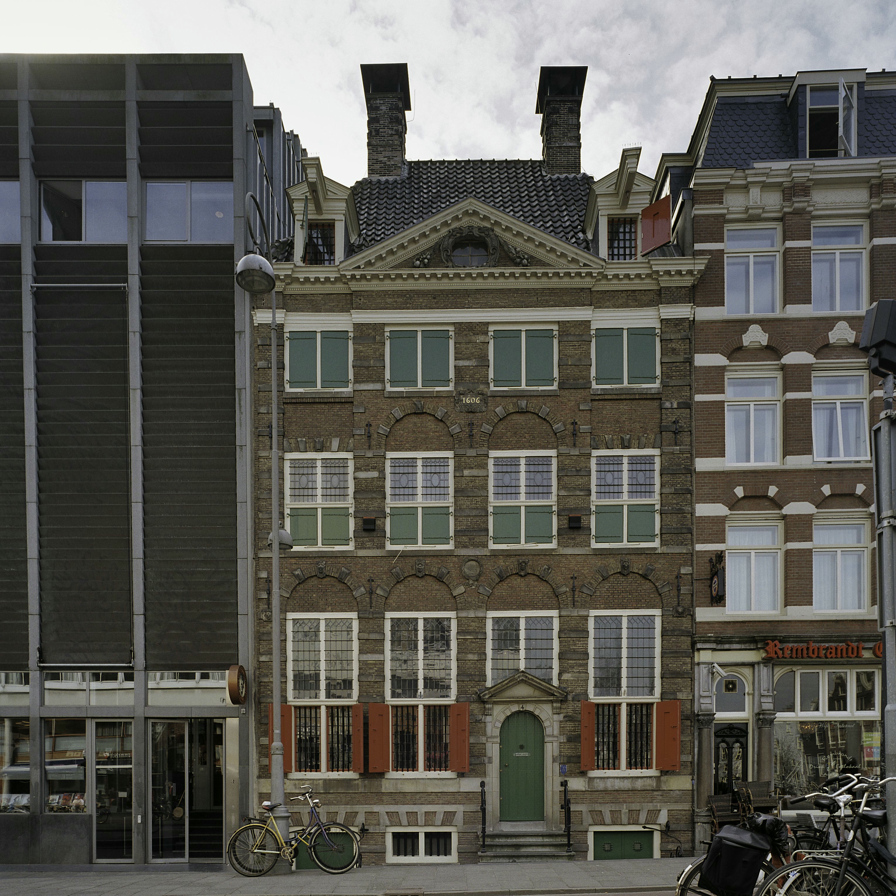 REMBRANDTHUIS: Voorgevel met ingangspartij (opmerking: Gefotografeerd voor Monumenten In Nederland Noord-Holland)